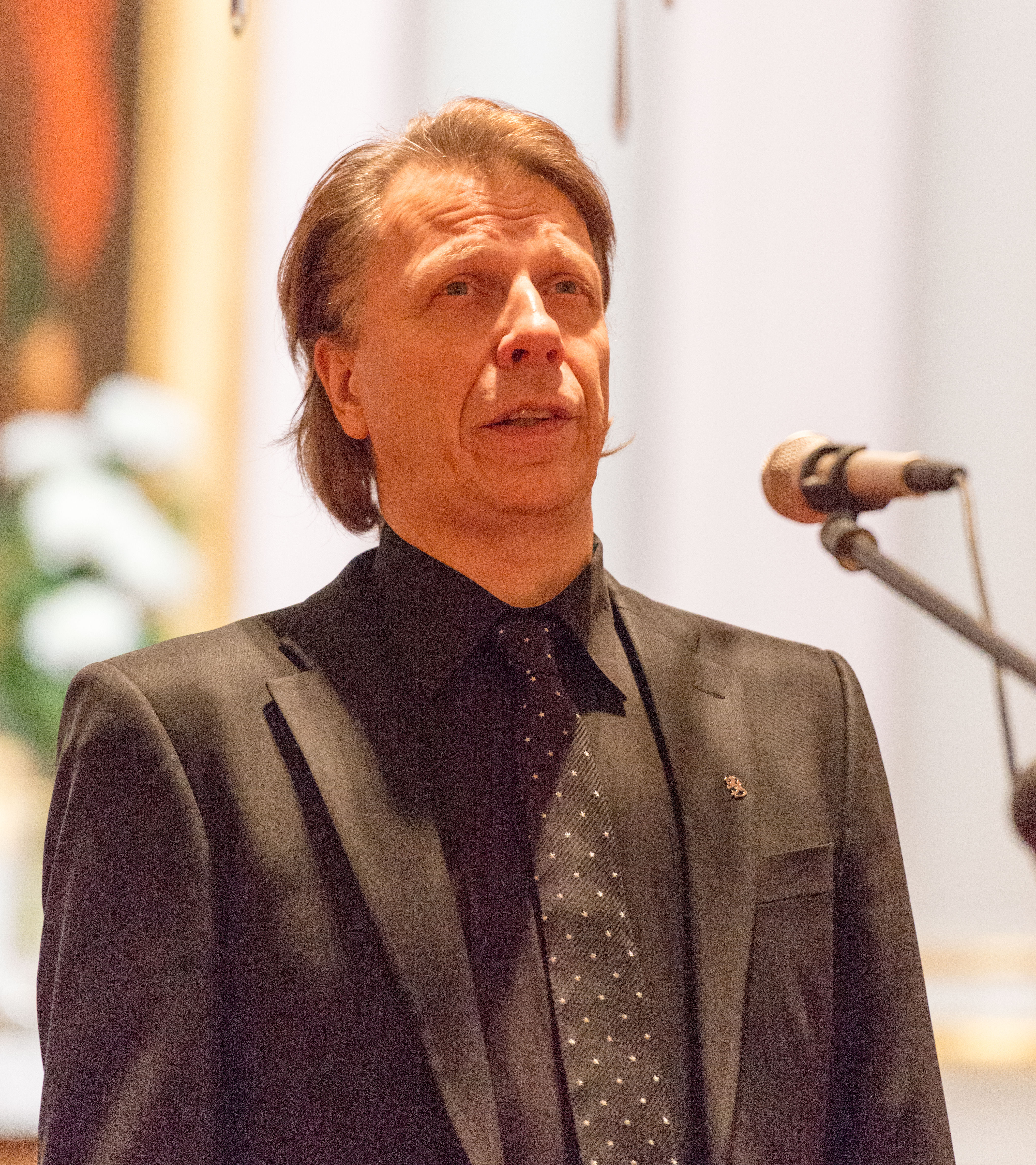 Lasse Riutamaa suomalainen tenori